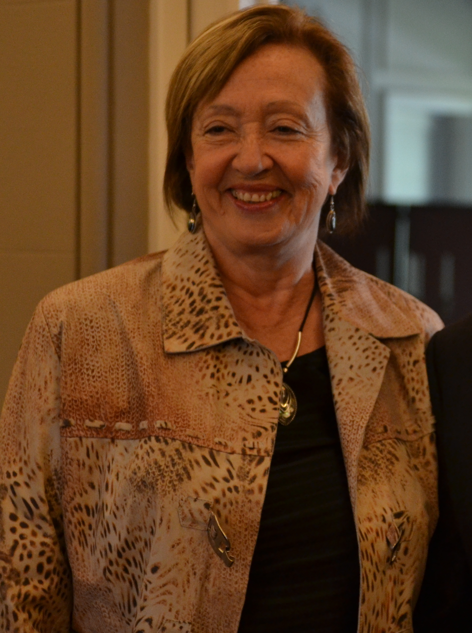 Lanzamiento del Festival Internacional Cervantino de Montevideo 2016. María Julia Muñoz, ministra de educación y cultura de Uruguay.